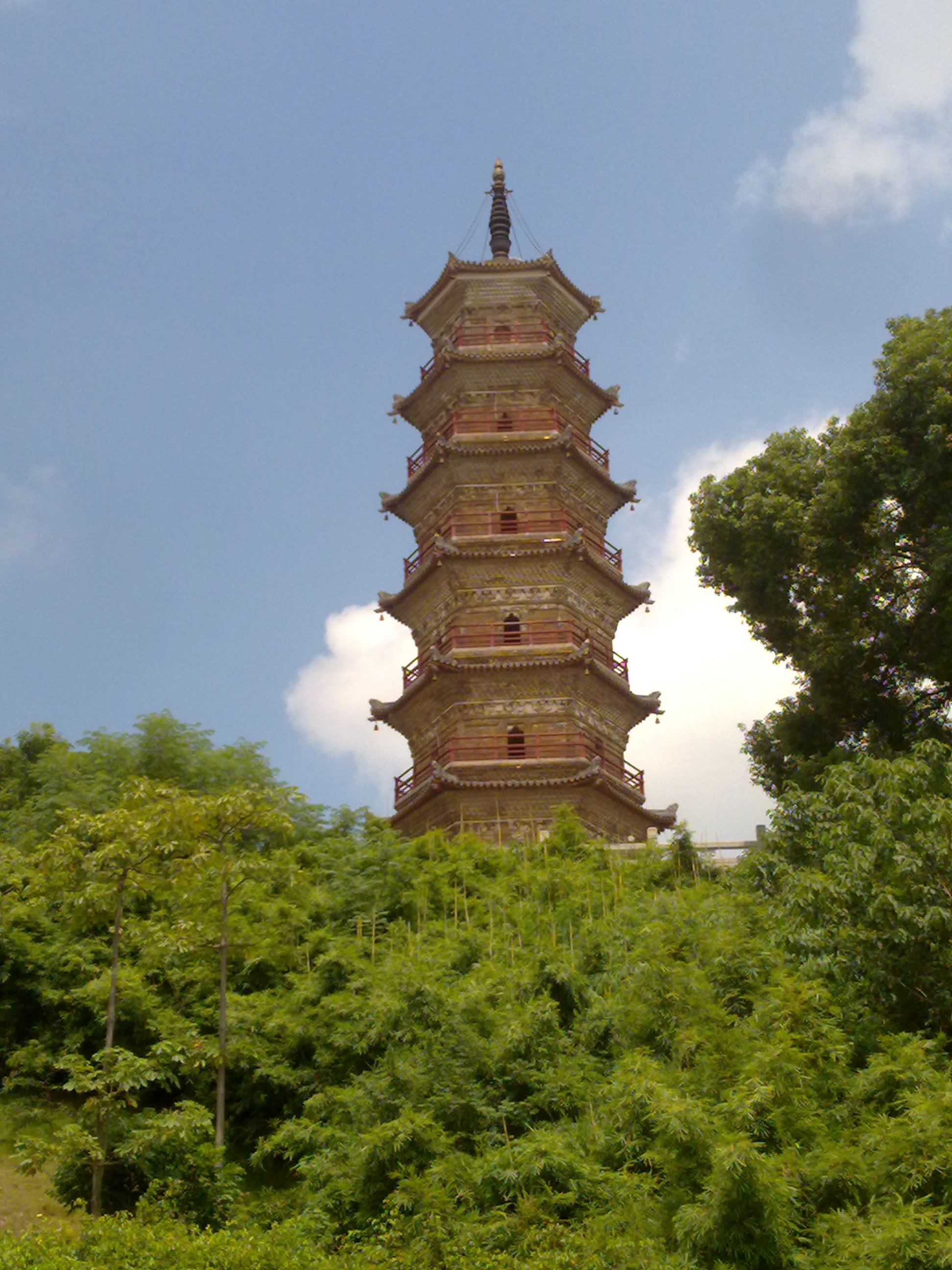 设于龟峰公园